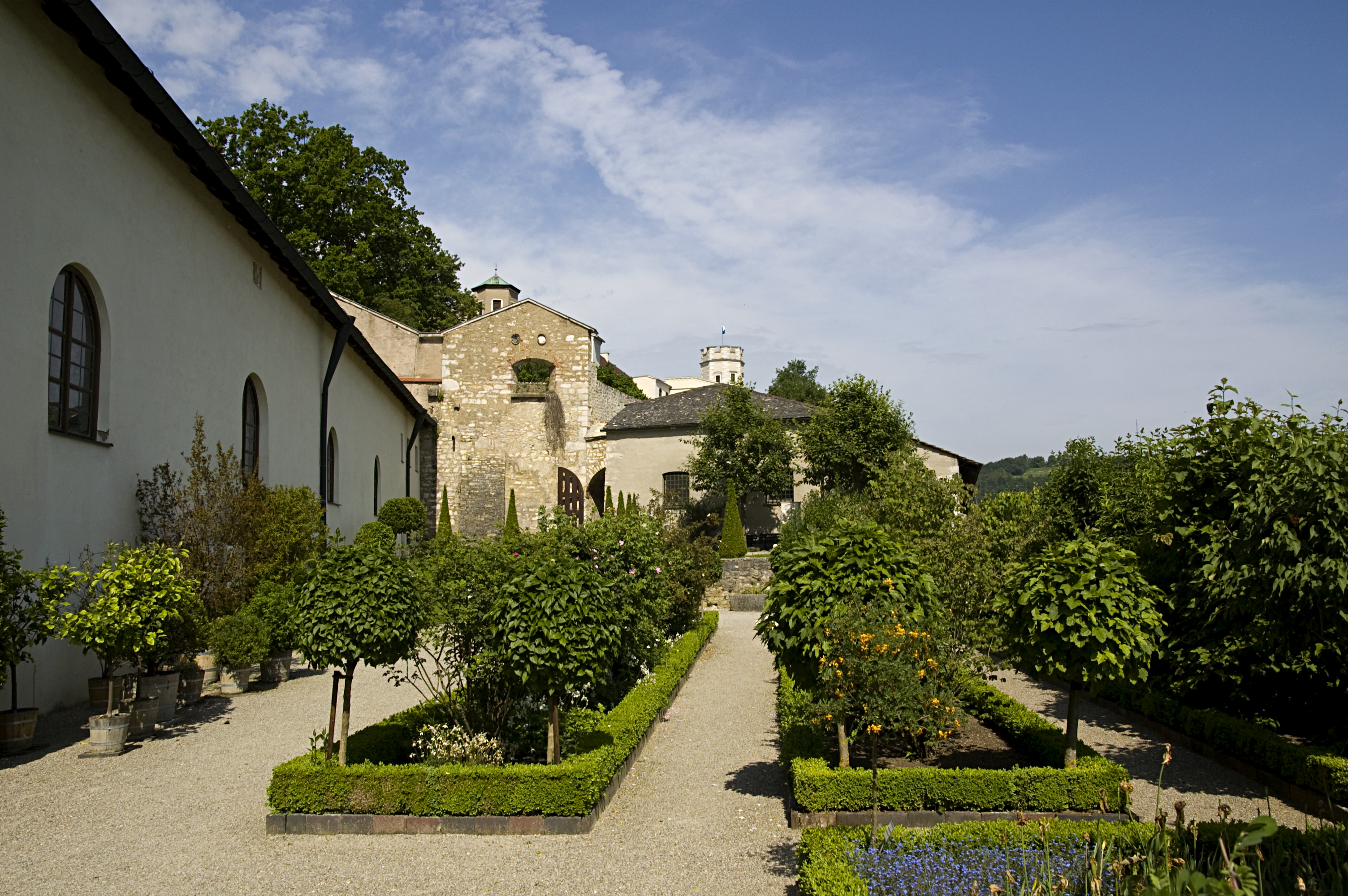 Im Bastionsgarten von Eichstätt - ohne Touristen - Blick auf die Willibaldsburg